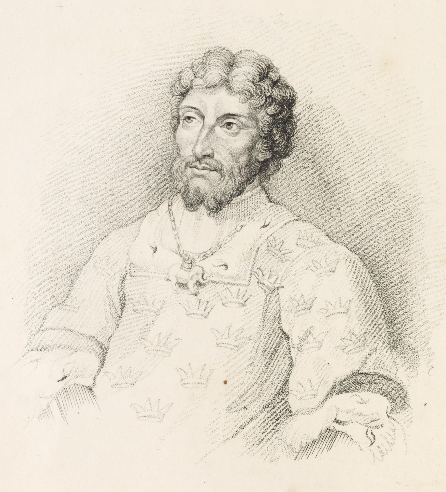 Illustrasjon hentet fra boken "Sketches on a tour to Copenhagen, through Norway and Sweden" av Wolff, Jens og utgitt av Baldwyn and Co. (gb, 1816)